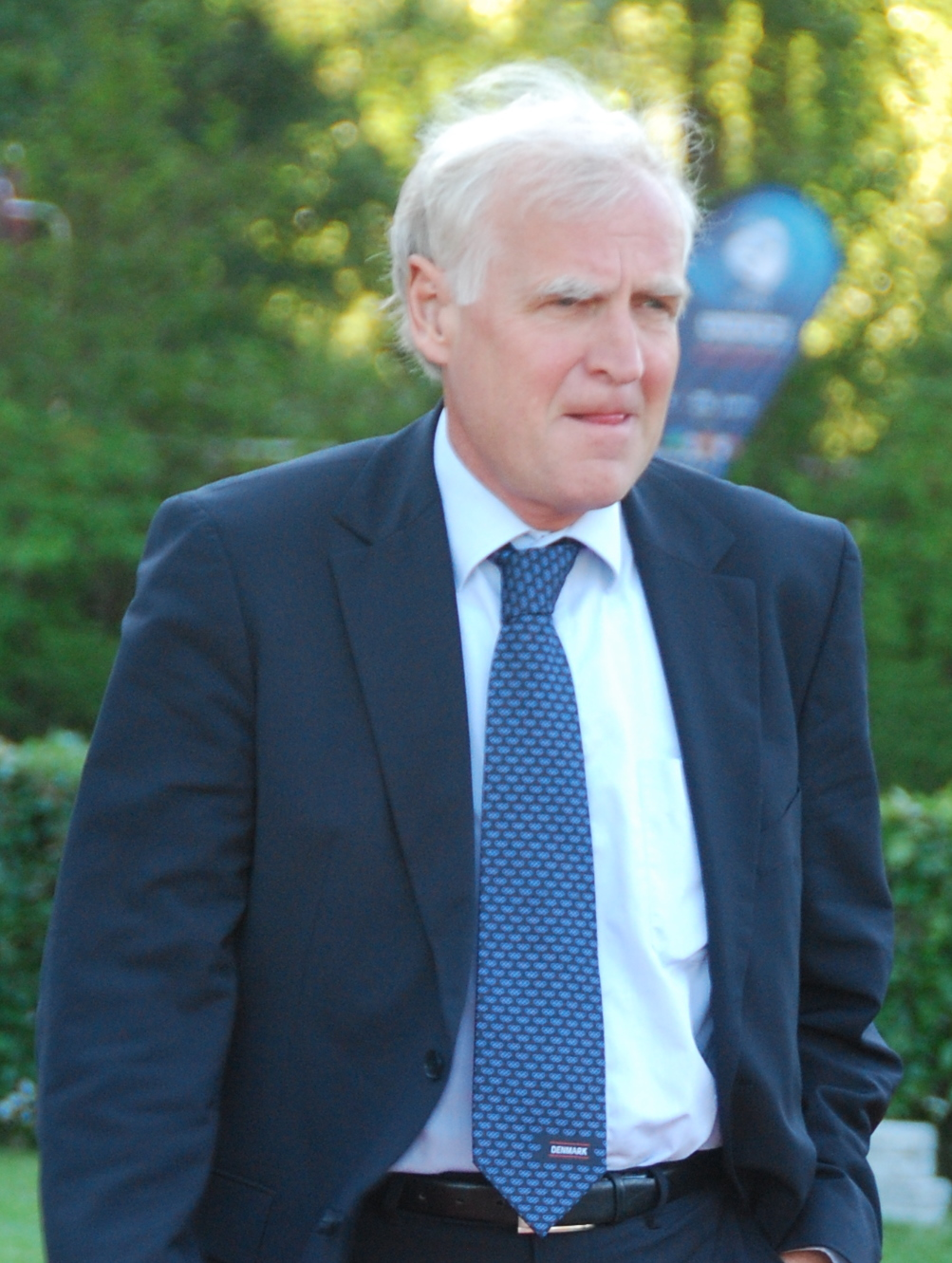 Niels Nygaard, formand for Danmarks Idræts-Forbund siden 2007.